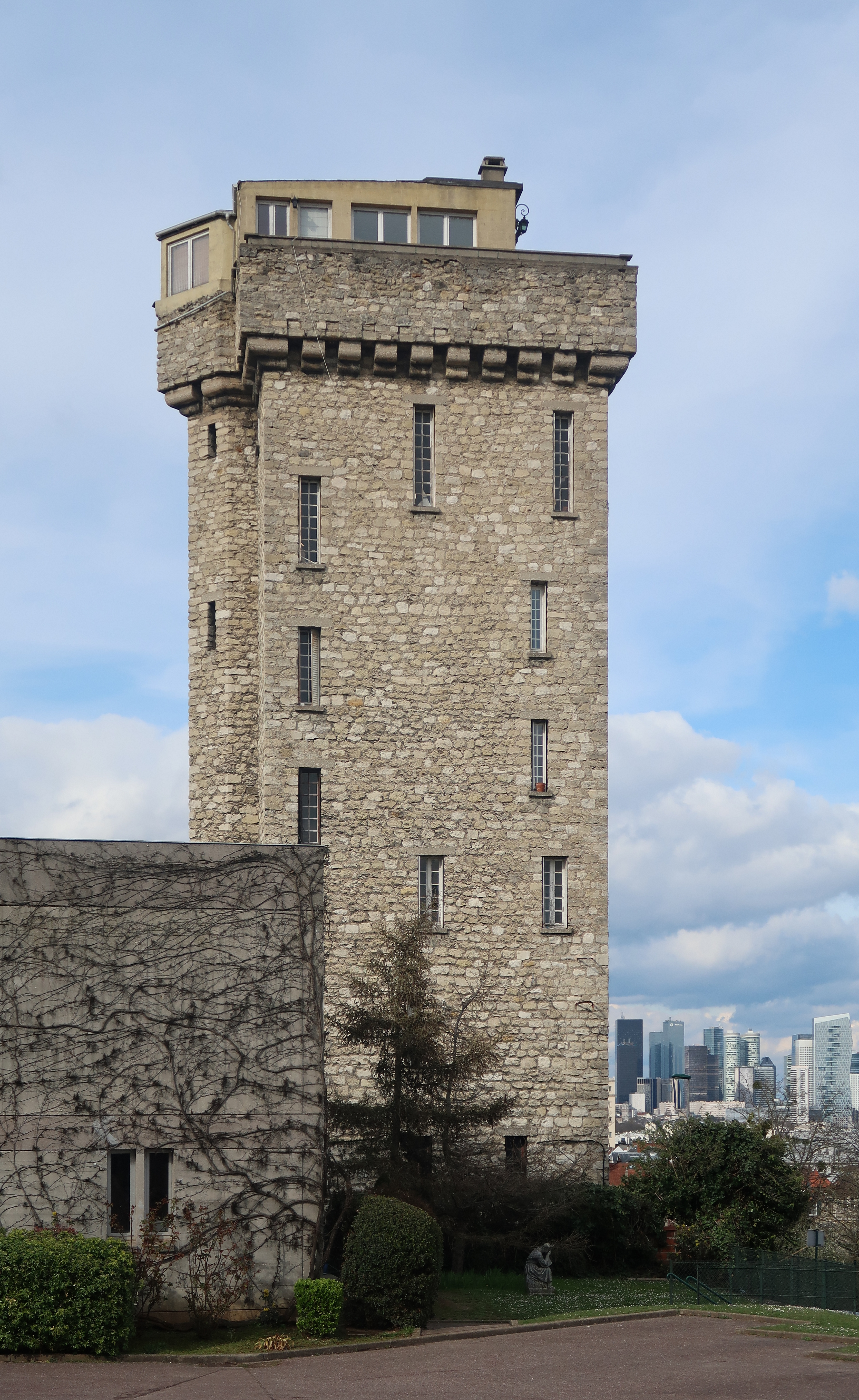 Tour de Suresnes (Hauts-de-Seine).